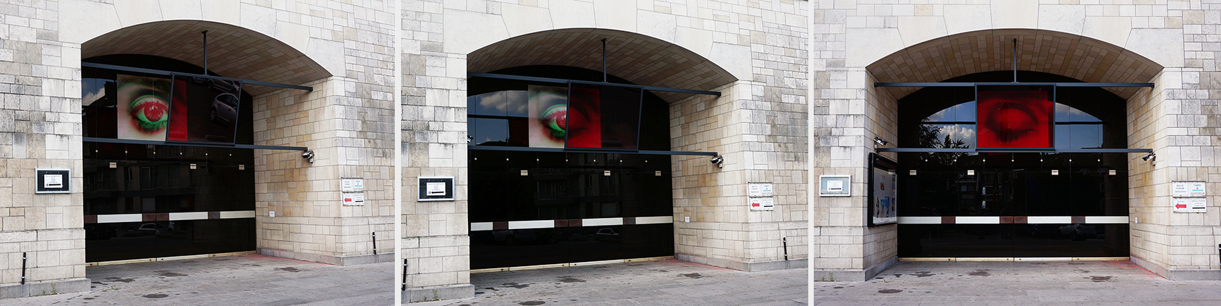 Un autocollant est collé sur la baie vitrée et une dalle de verre rouge est suspendue devant. L'oeuvre fonctionne grace au mouvement du visiteur. En fonction de sa position il verra l’œil ouvert ou fermé.